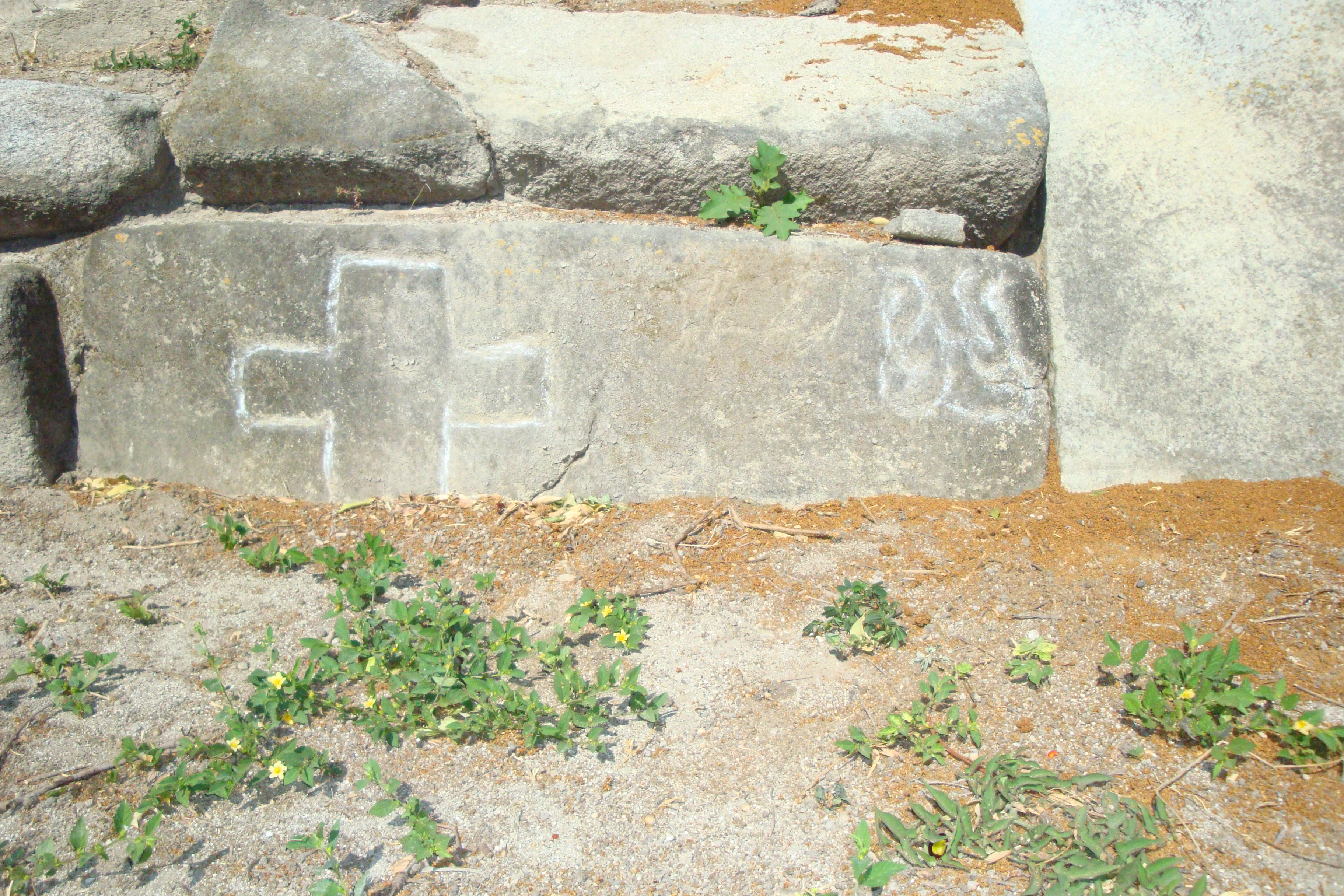 Iglesia vieja Petroglifos_1